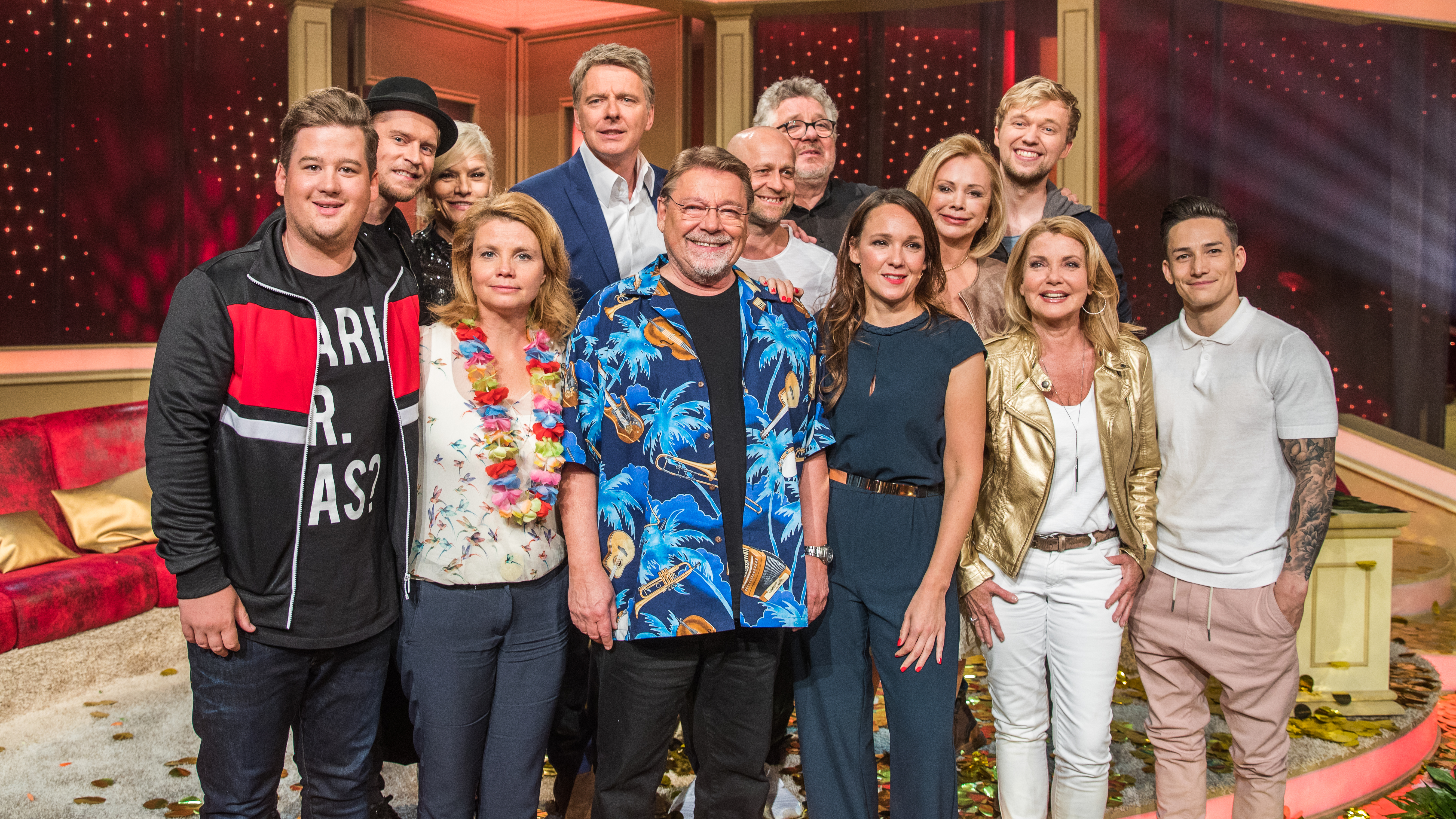 „Mensch Jürgen - von der Lippe wird 70“. Die Geburtstagsshow wird präsentiert von Jörg Pilawa. Fototermin nach Ende der Aufzeichnung. Sendetermin: 9. Juni 2018 um 20.15 Uhr im ErstenGruppenfoto